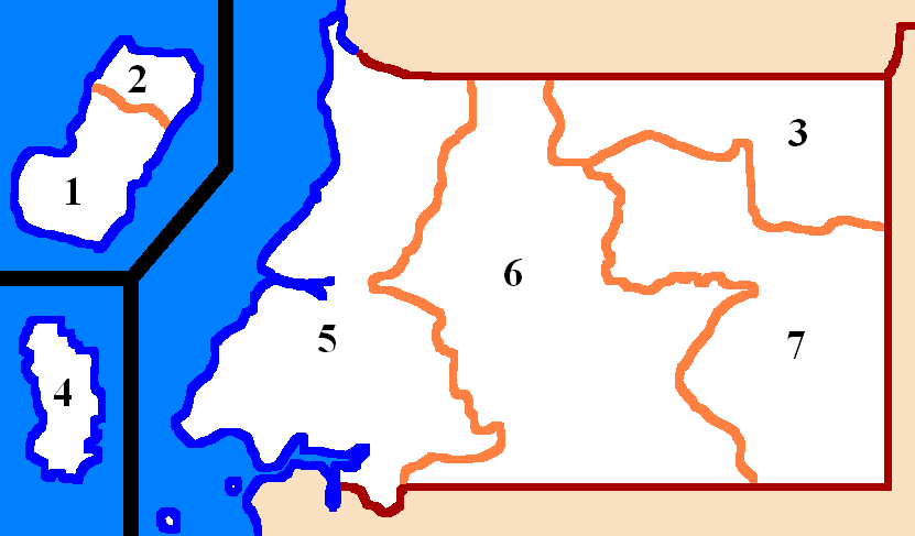 Mapa Gwinei Równikowej prowincje numerowana